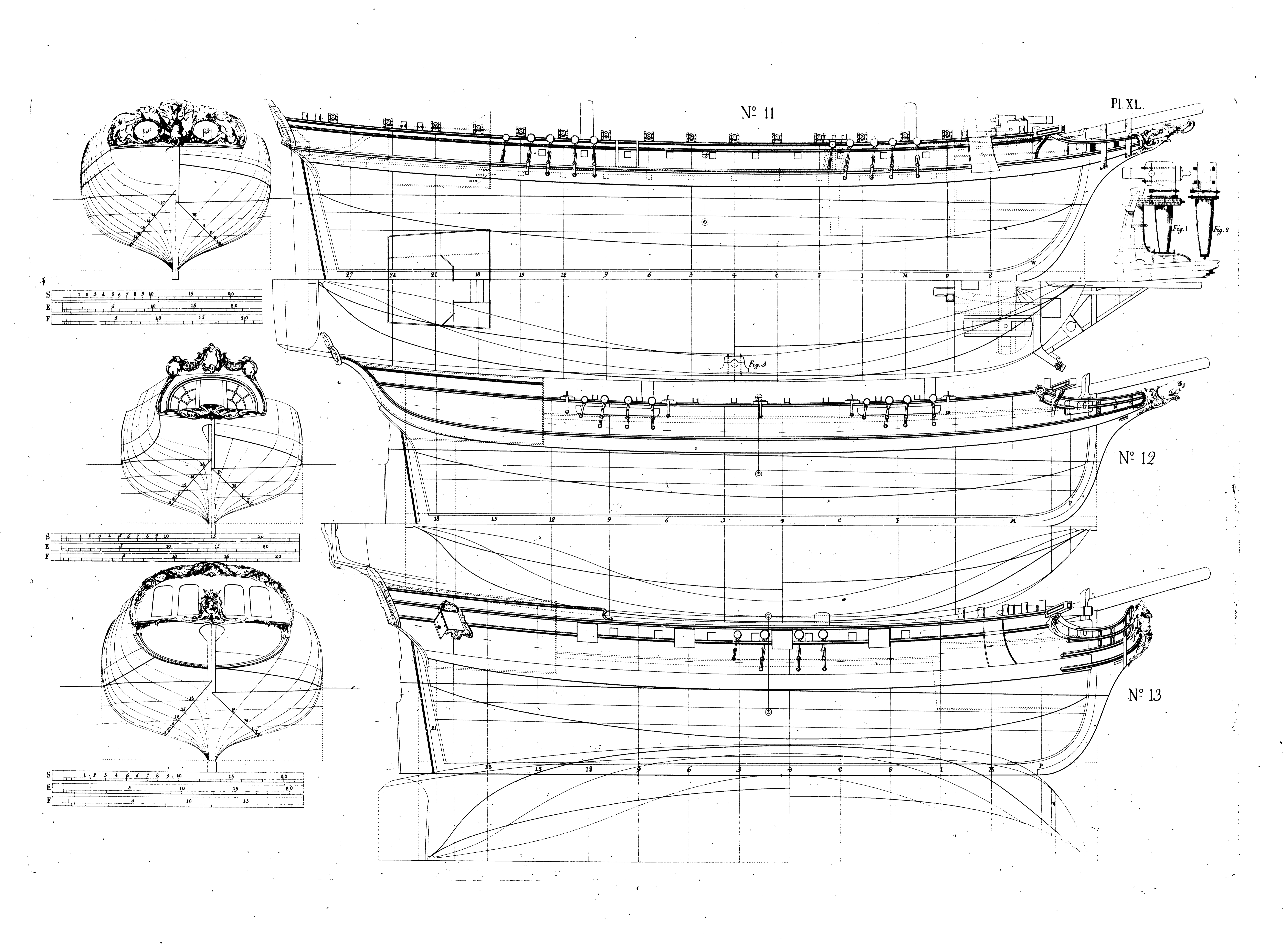 Tafel 40 von Fredrik Henrik af Chapmans ARCHITECTURA NAVALIS MERCATORIA, 1768